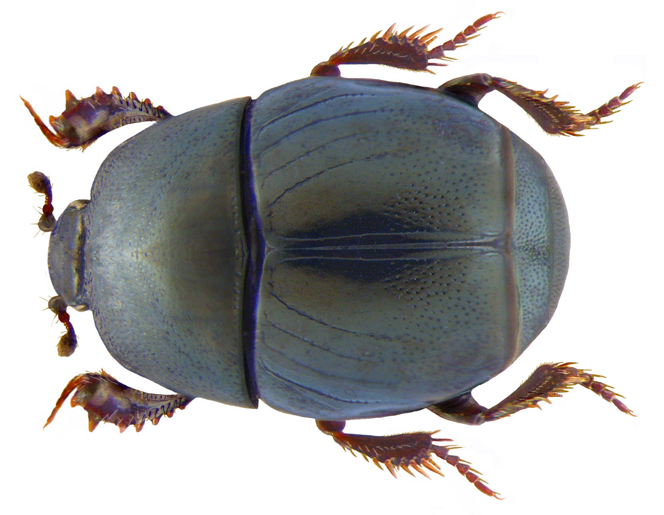 Familie: Histeridae Grösse: 2,5-3,5 mm Verbreitung: Europa Ökologie: unter Exkrementen und Aas auf sandigen Böden Fundort: Italien, Tirrenia leg.det. U.Schmidt, 1973 Foto: U.Schmidt, 2008